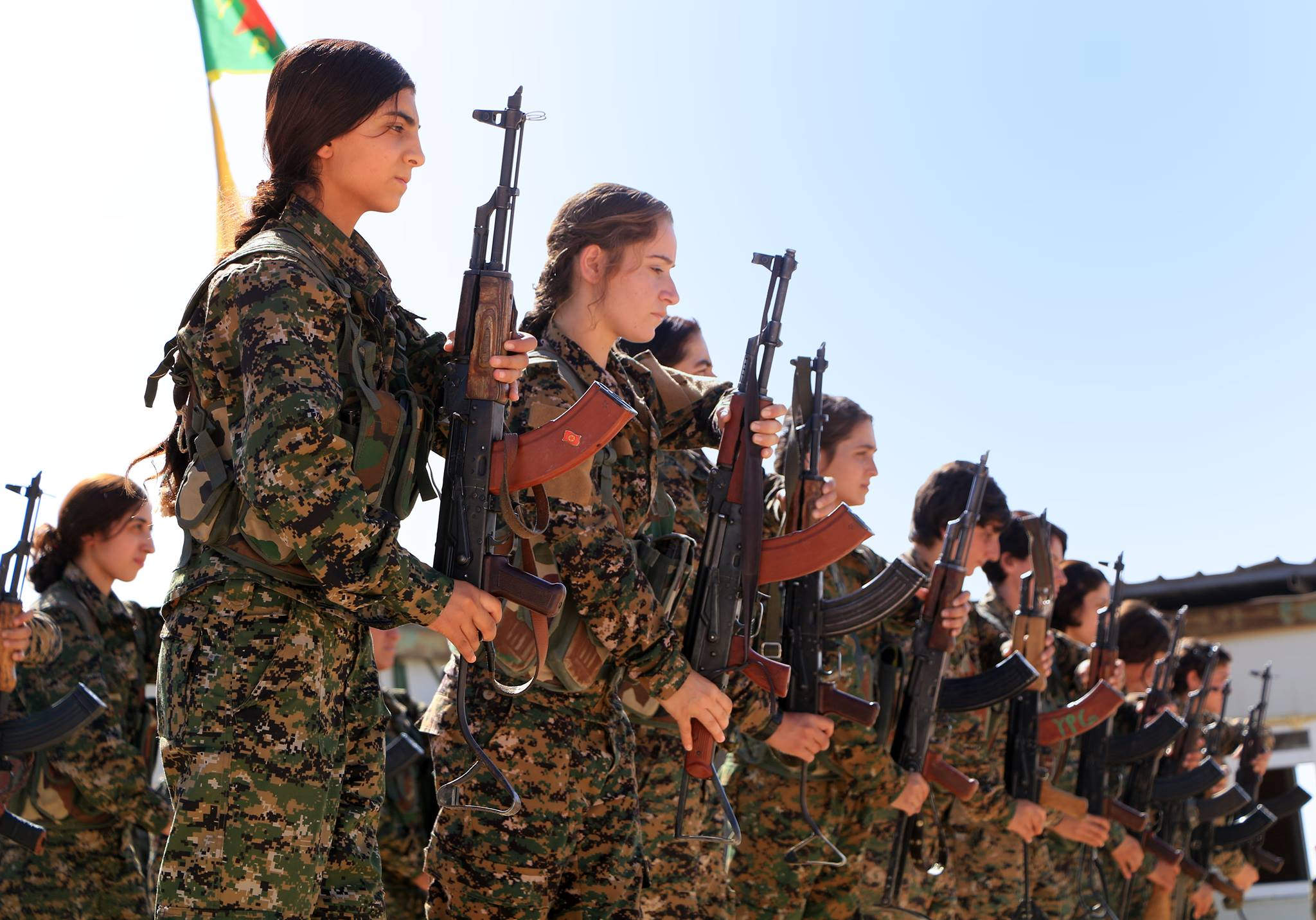 YPJ